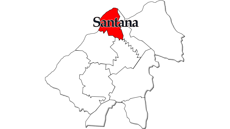 Evolução da População